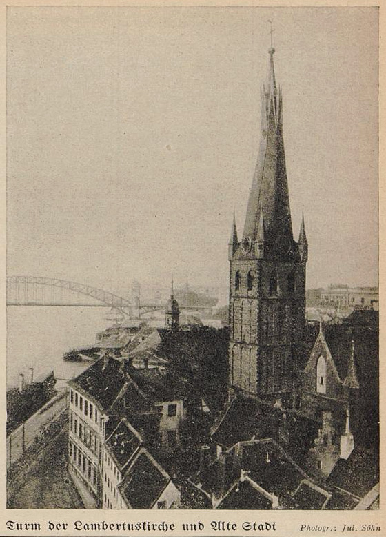 Turm der Lambertuskirche und Alte Stadt, Foto Julius Söhn, Adressbuch Düsseldorf 1937